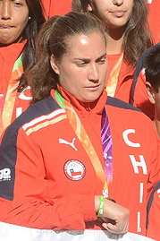 Karen Gallardo, atleta chilena.